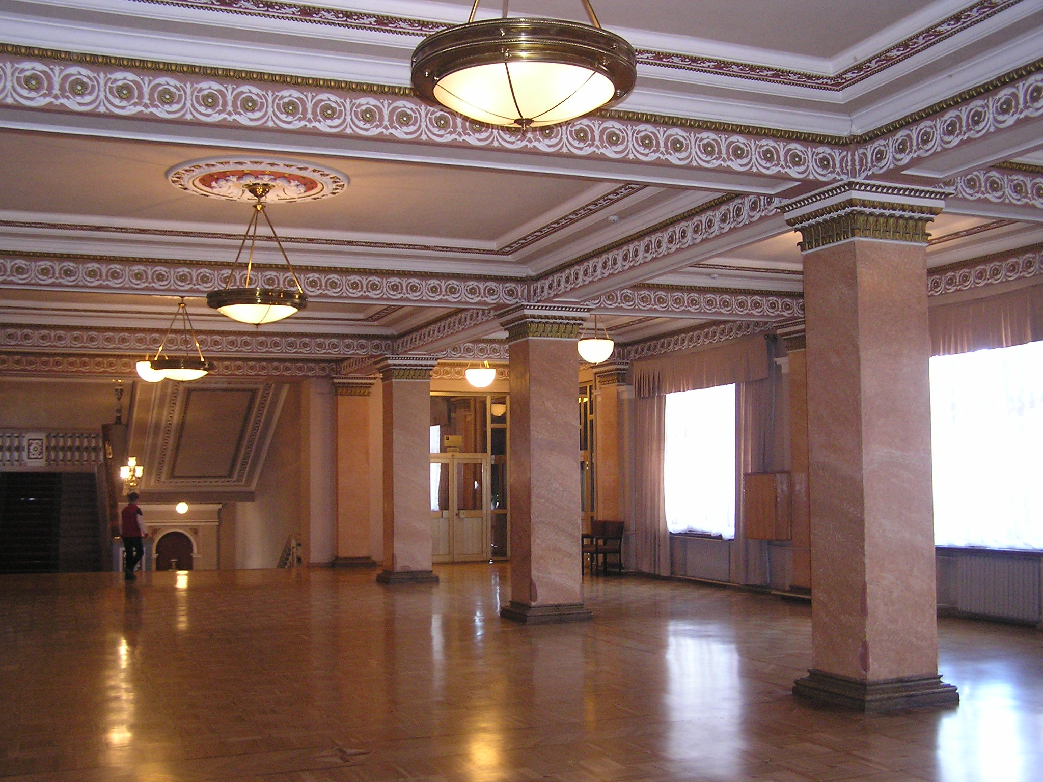 Донецкий академический государственный театр оперы и балета им. А.Б.Соловьяненко